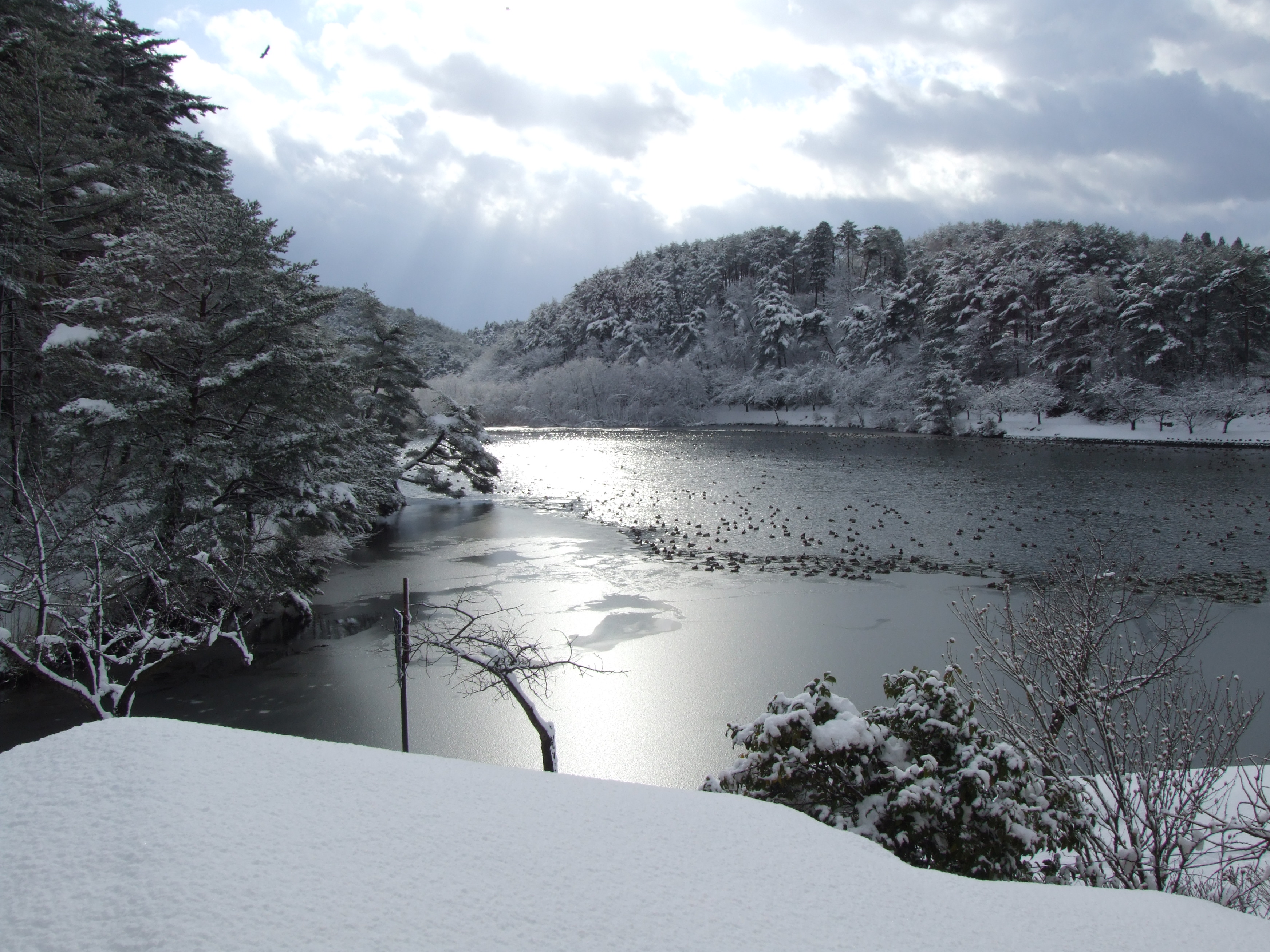 冬のますがた